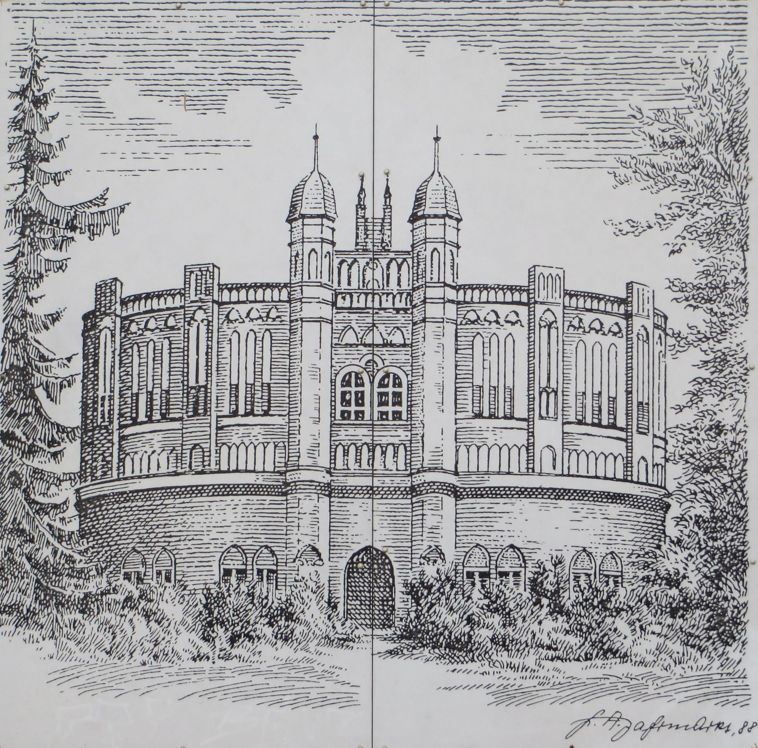 Zeichnung des ehemaligen Wasserhochbehälters auf dem Helenenberg an Wand des Industriegebäudes Westfalenstraße 12 in Witten, lokal als Wasserschlösschen bekannt